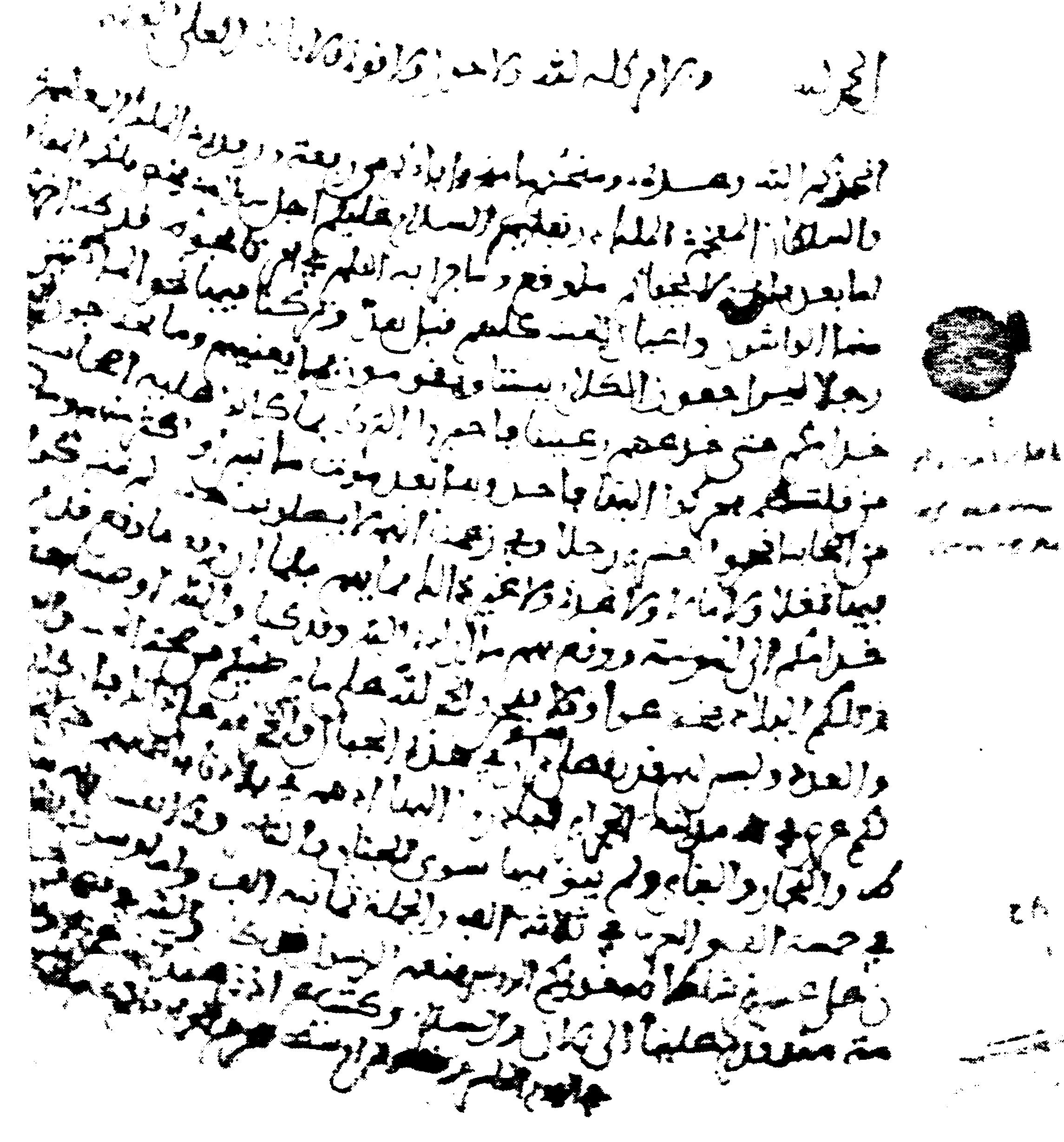 Lettre du roi de Koukou 'Amar Belkadi à Philippe II d'Espagne (1598) . Source : [1]